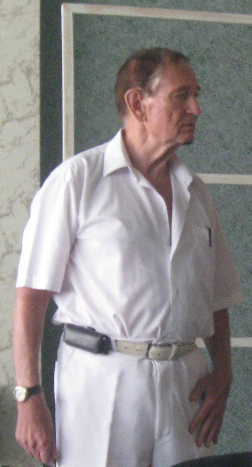 Проф. Алексєєв А.Д. на засіданні спеціалізованої вченої ради із захисту дисертацій в Інституті фізики гірничих процесів НАН України.